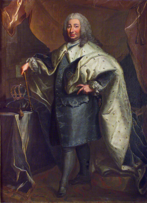 King Fredrik I of Sweden (1676-1751), ruled 1720-1751